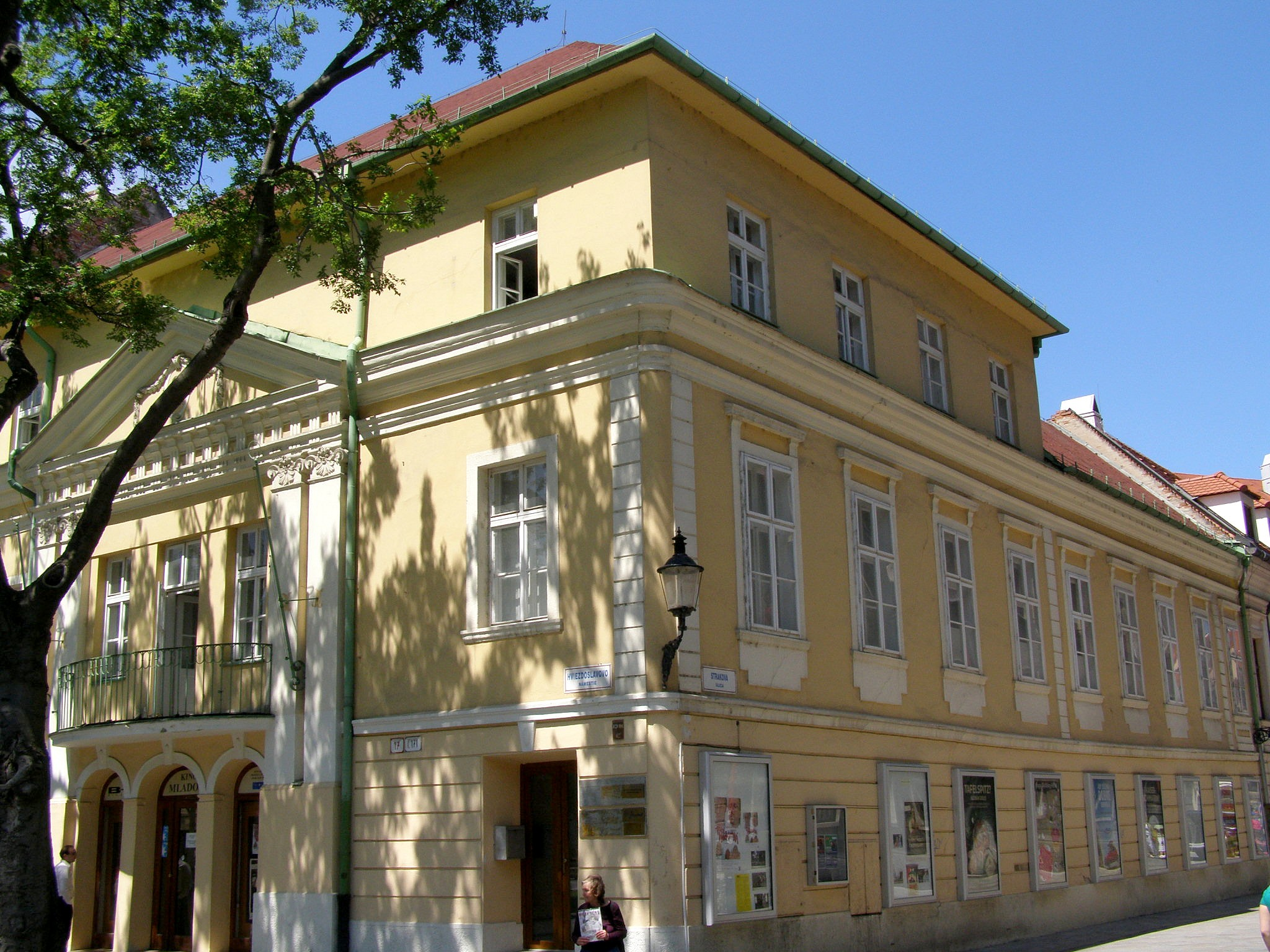 Hviezdoslavovo nám. č. 17 - kino Mladosť